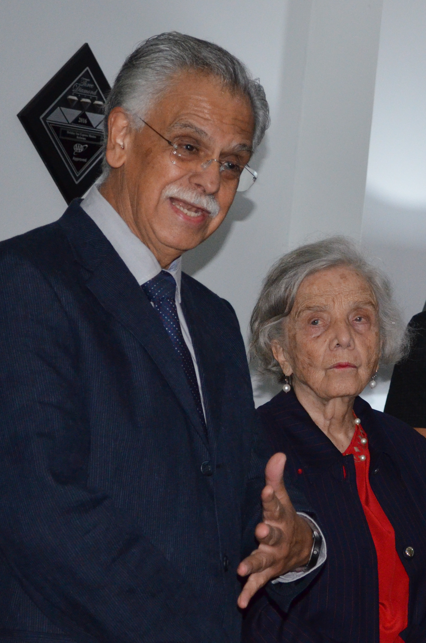 Jueves 10 de agosto de 2017. En el camellón de Reforma, frente al número 222, se inauguró la exposición fotográfica Migrantes en el Mediterráneo, del artista español Gabriel Tizón. Al acto acudió Eduardo Vázquez Martín y Patricia Mercado secretarios de Cultura y Gobierno de la Ciudad de México, respectivamente; así como la escritora Elena Poniatowska; Leonardo Lomeli Villegas, Secretario General de la Universidad Nacional Autónoma de México; Carlos Martínez Assad, coordinador del Seminario Culturas del Medio Oriente de la UNAM; la autoridad del Centro Histórico, Jesús González Schmal y el fotógrafo, autor de la exposición Gabriel Tizón. Fotografía: Poleth Rivas / Secretaría de Cultura CDMX.